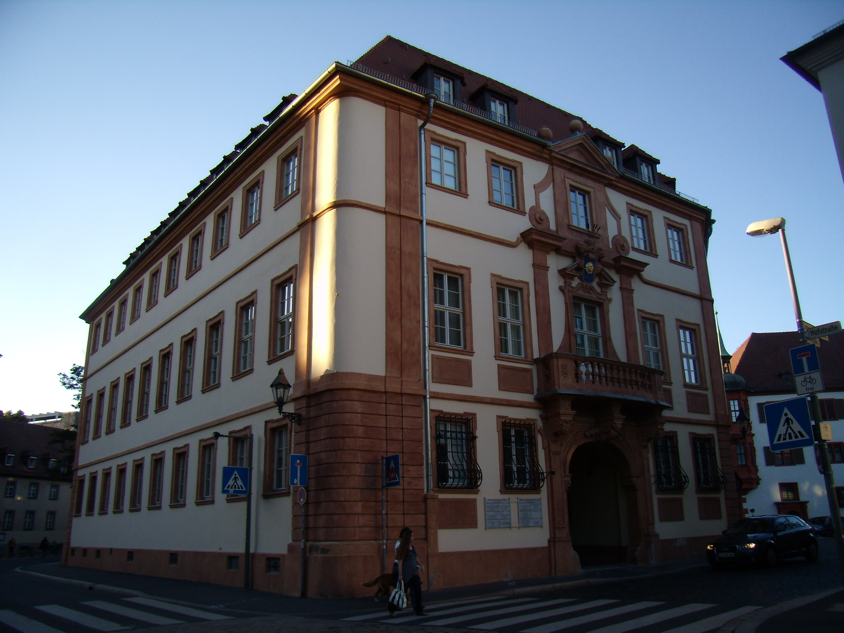 Würzburg - Kardinal-Döpfner Platz 1